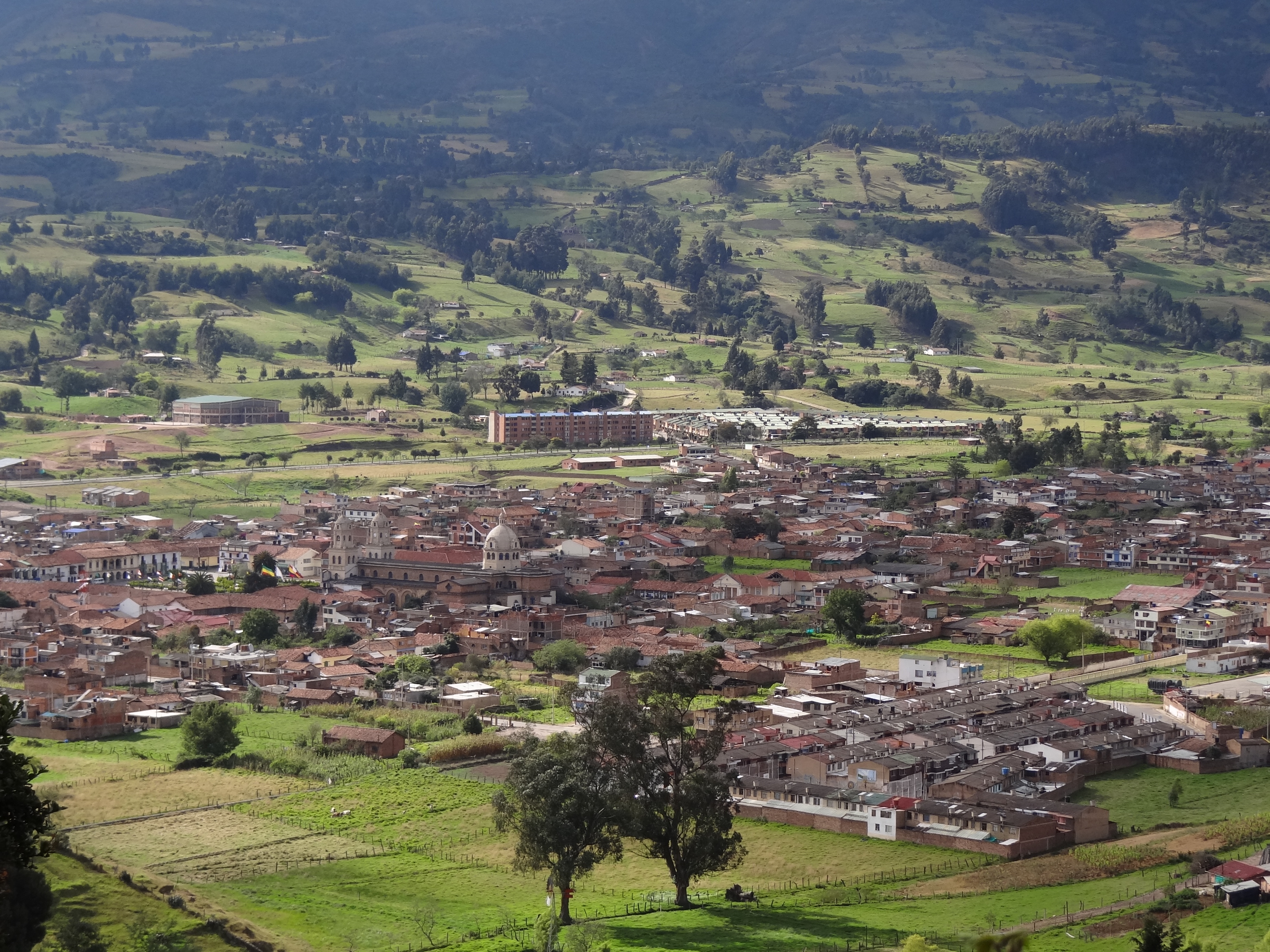 Panorámica del municipio de Santa Rosa de Viterbo, departamento de Boyacá, Colombia